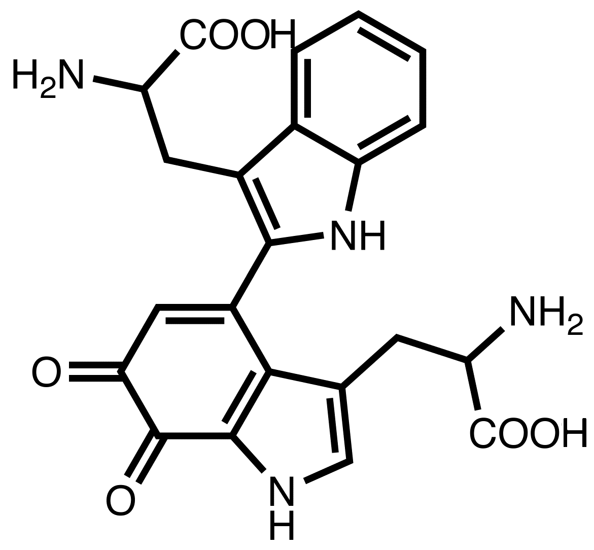 Representació bidimensional del cofactor TTQ